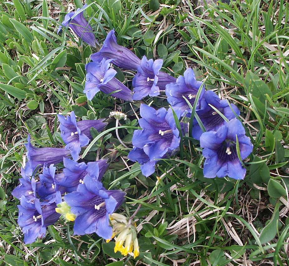 Clusius-Enzian (Gentiana clusii), Nähe Liezener Hütte, Wörschach, Steiermark, Österreich